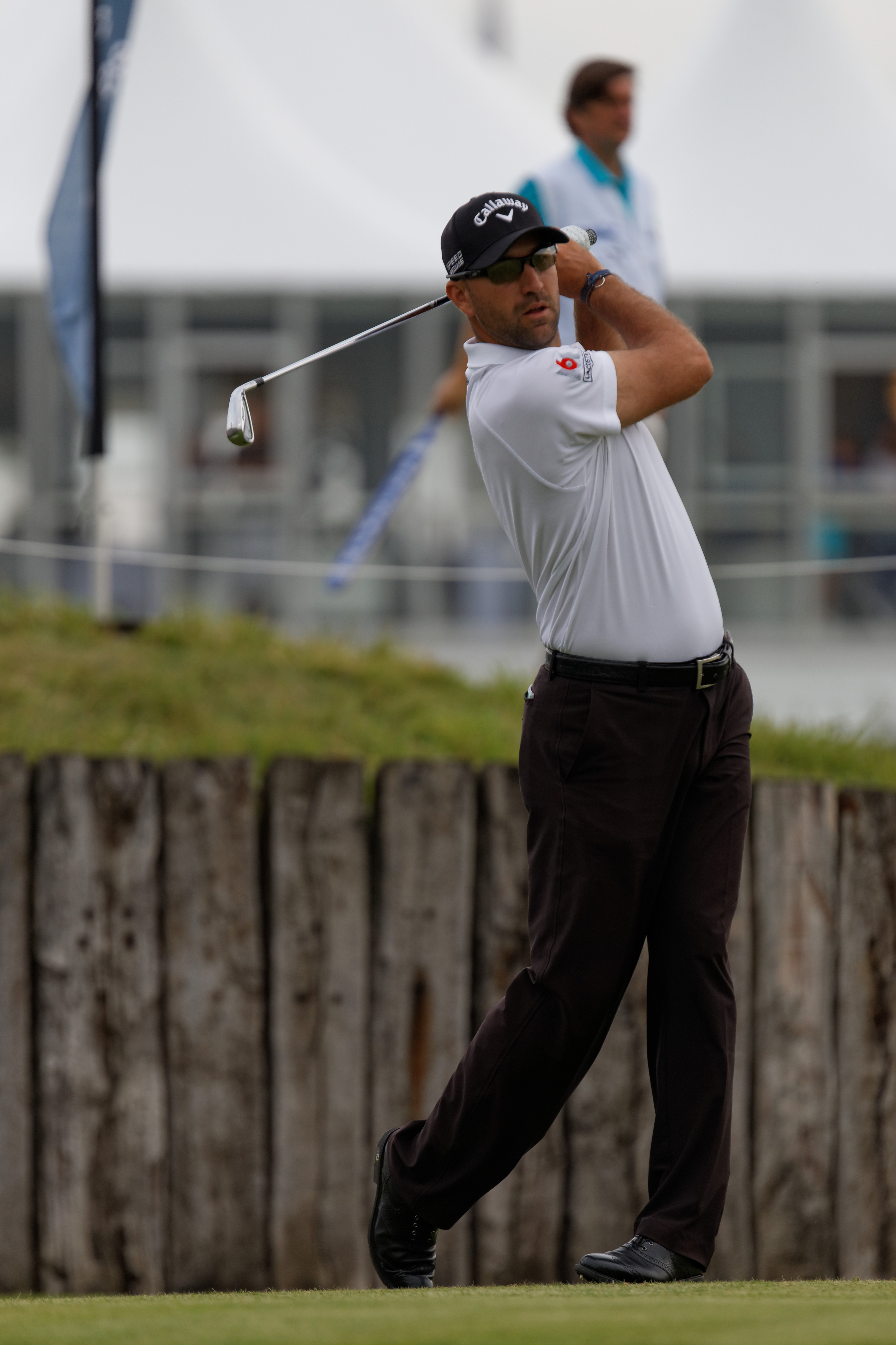 Anthony Snobeck lors du second tour de l'Open de France 2014 - Golf National - Saint-Quentin-en-Yvelines (78) - départ du trou n° 10